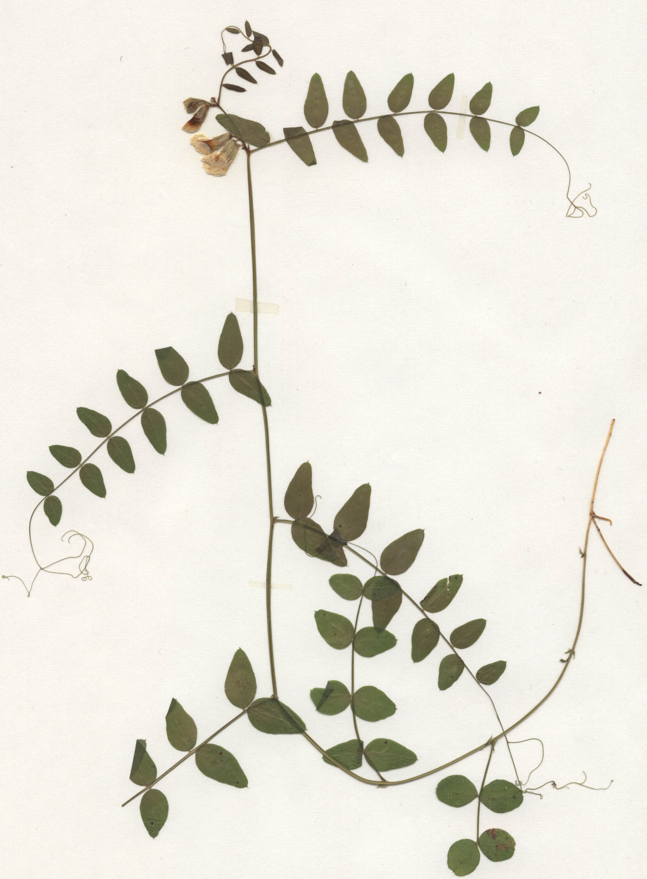 Vicia sepium f albiflora, eigener Herbarbeleg von 1978, Unterfranken